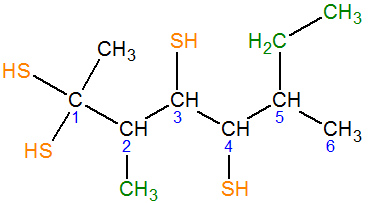 5-etil-2-metil-hexano-1,1,3,4-tetratiol